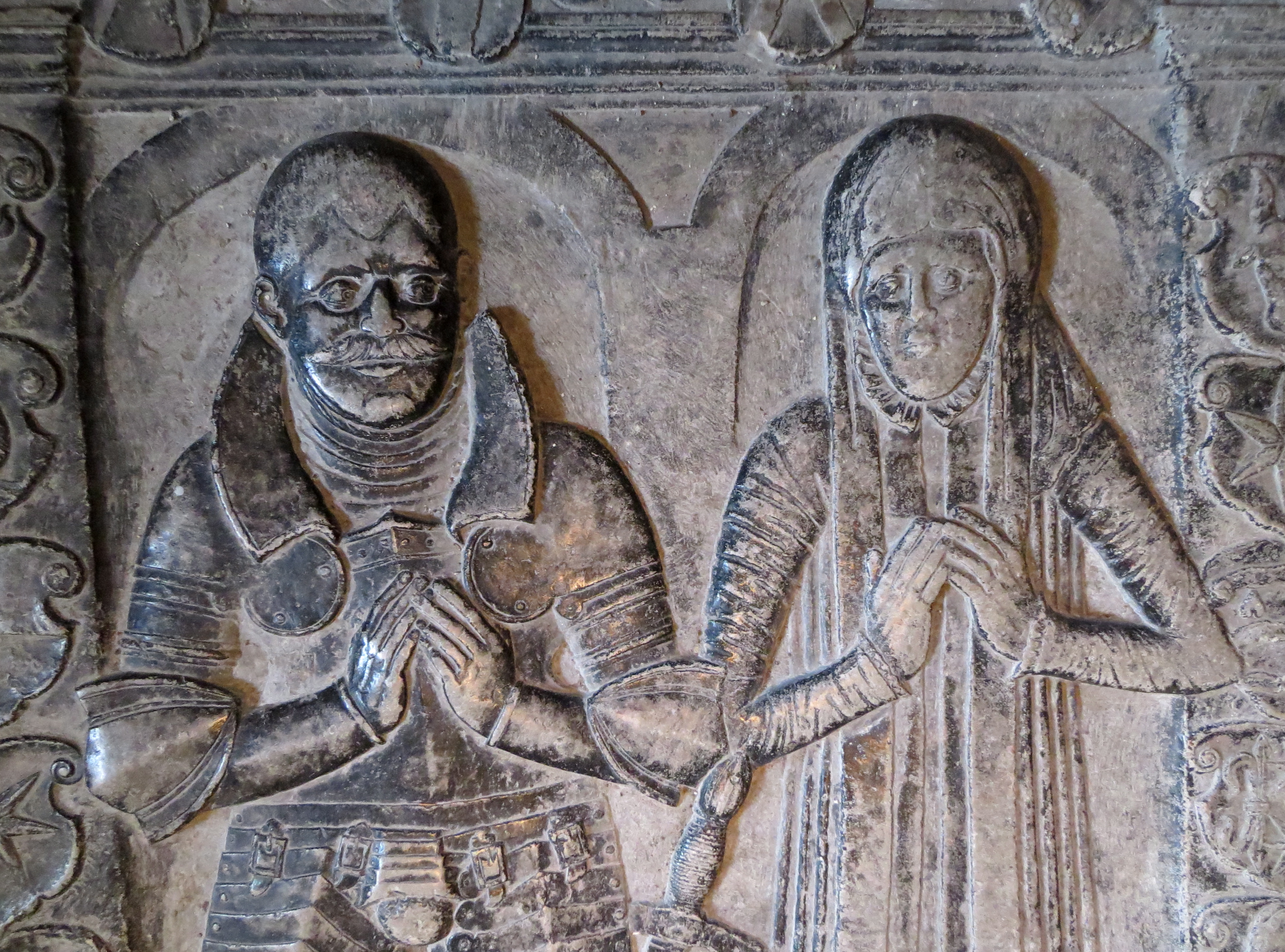 Rigsråd Lave Brahe (1500-1567) og Gørvel Sparre (1517-1605). Detalje fra gravsten i hvid skifermarmor i Lund Domkirkes krypt.